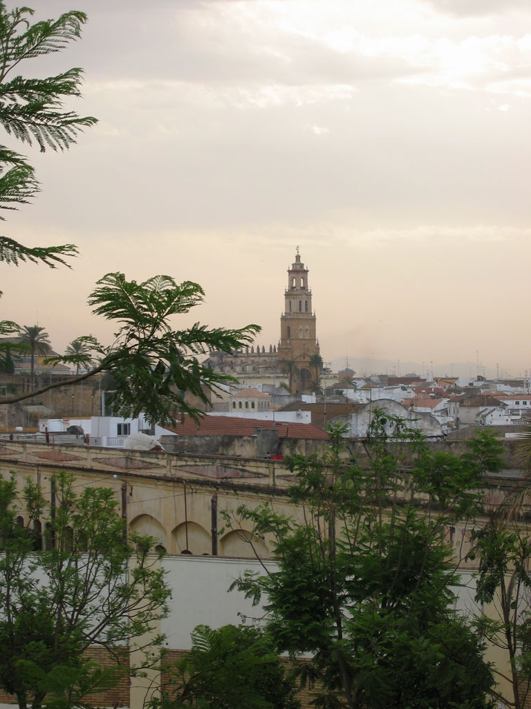 Vista del campanario de la torre de la iglesia de Sta. María de la Mesa. En Utrera (Sevilla)